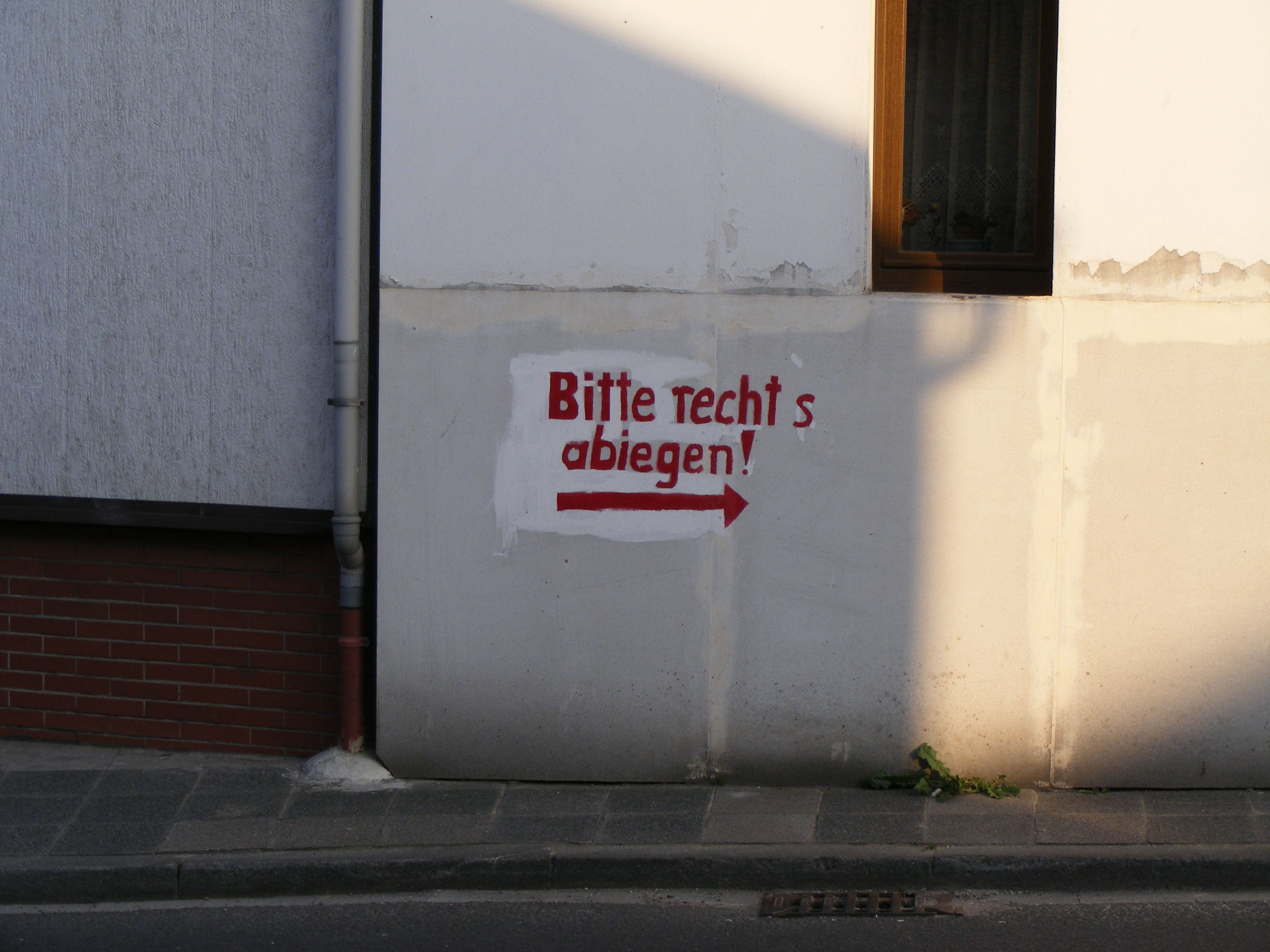 Ironische Hausinschrift „Bitte rechts abiegen“ eines durch Unfallfahrer genervten Hauseigentümers in Kirchheim an der Weinstraße in der Weinstraße Nord